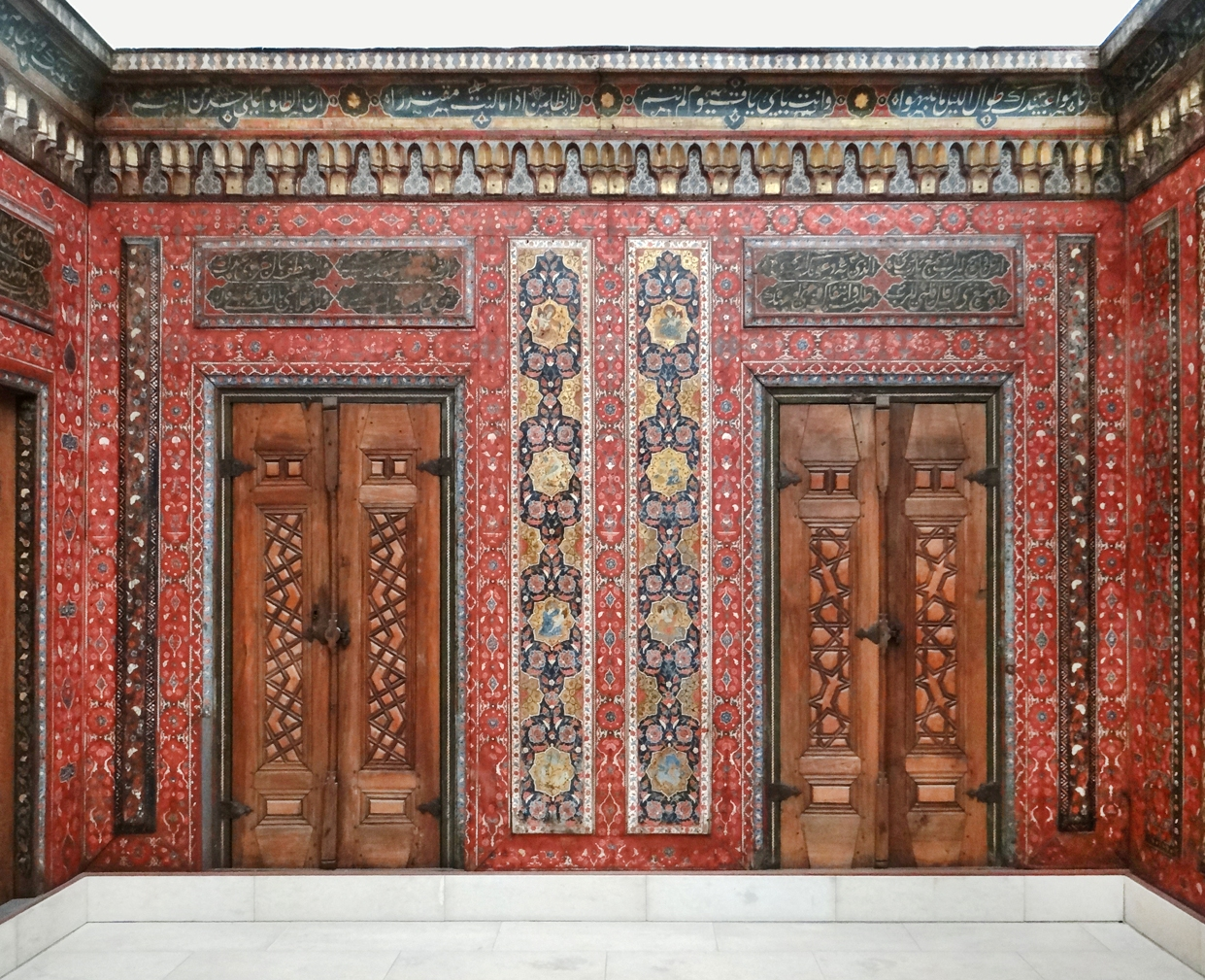 La chambre d'Alep (partie centrale, détail) réalisée en 1600-1601, 1603 (période ottomane) Alep, Syrie Peintures sur bois Lambris hauteur 2,6 m longueur 35m Artiste : Halab Chah ibn Isa. Chambre présentée dans le musée d'art islamique de Berlin / Museum für Islamische Kunst La chambre d'Alep a été achetée en 1912 pour le musée. Les décors peints sont d'une très grande qualité, ils permettent de mieux connaître la vie à Alep à cette époque et les relations qui existaient entre les communautés religieuses. Le propriétaire d'une maison d'Alep, un riche marchand de biens chrétien, fit exécuter cet ensemble de lambris pour sa salle d'apparat au début du XVIIe siècle. Il constitue le plus vieil exemple de peintures dans un lieu d'habitation à l'époque ottomane en Syrie. Le commanditaire chrétien confia les travaux au meilleur atelier, désirant décorer ce salon de réception de motifs très différents dans le style de l'enluminure ottomane de l'époque, avec fond floral ou géométrique. On distingue donc des thèmes tirés de l'Ancien et du Nouveau Testament, une représentation de la Vierge à l'enfant, à côté de scènes de chasse telles qu'on en trouve dans l'enluminure persane. Les citations des psaumes, les proverbes arabes et les formules persanes qui courent le long des panneaux sont eux aussi choisis pour évoquer la coexistence pacifique d'hommes de religions différentes. Extrait du site Découverte de l'art islamique / musée sans frontières